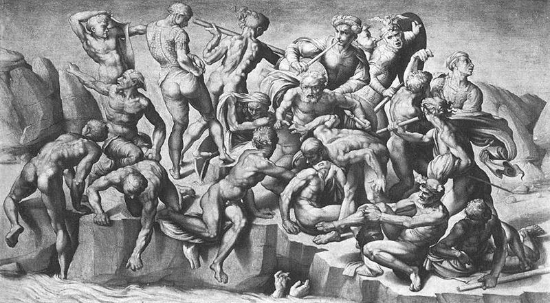 nach Michelangelos Schlacht von Cascina